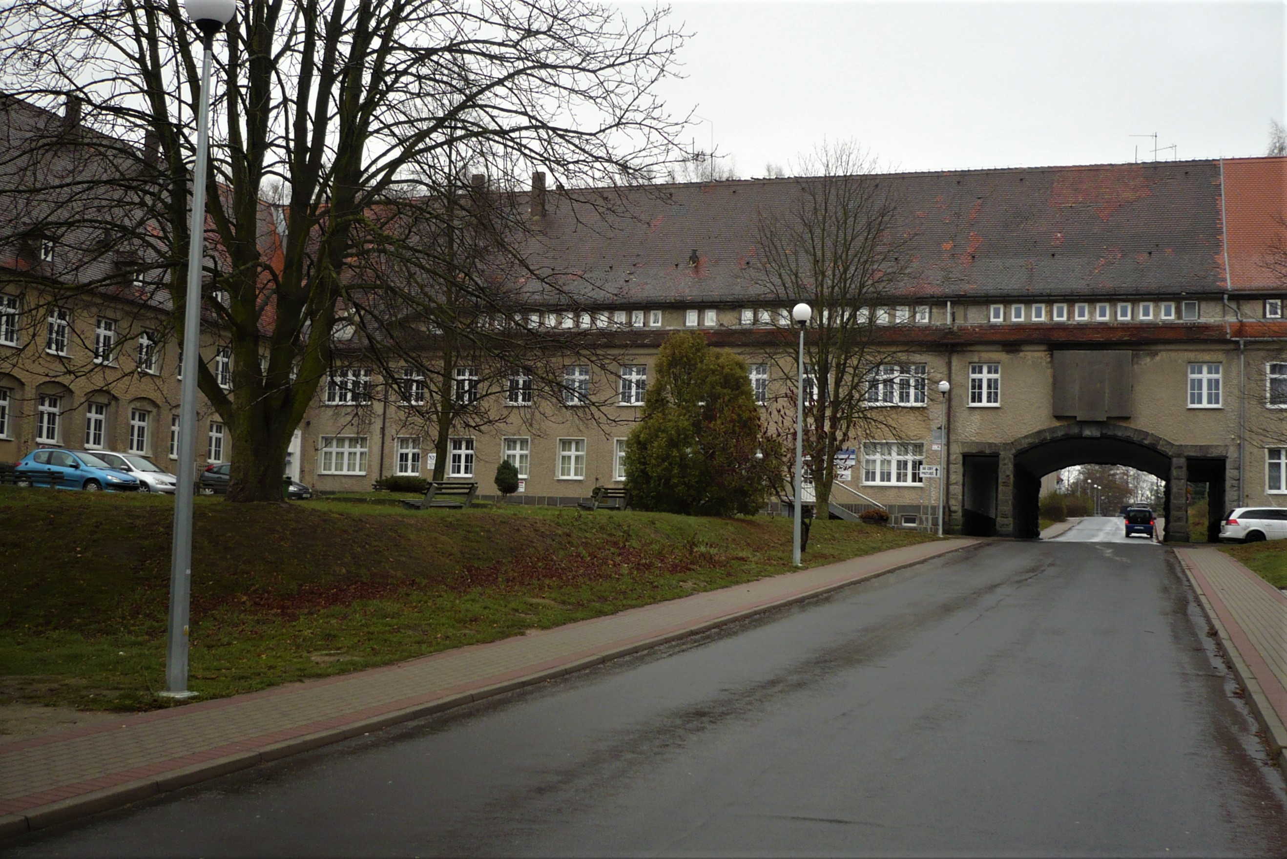 Sieniawka koszary